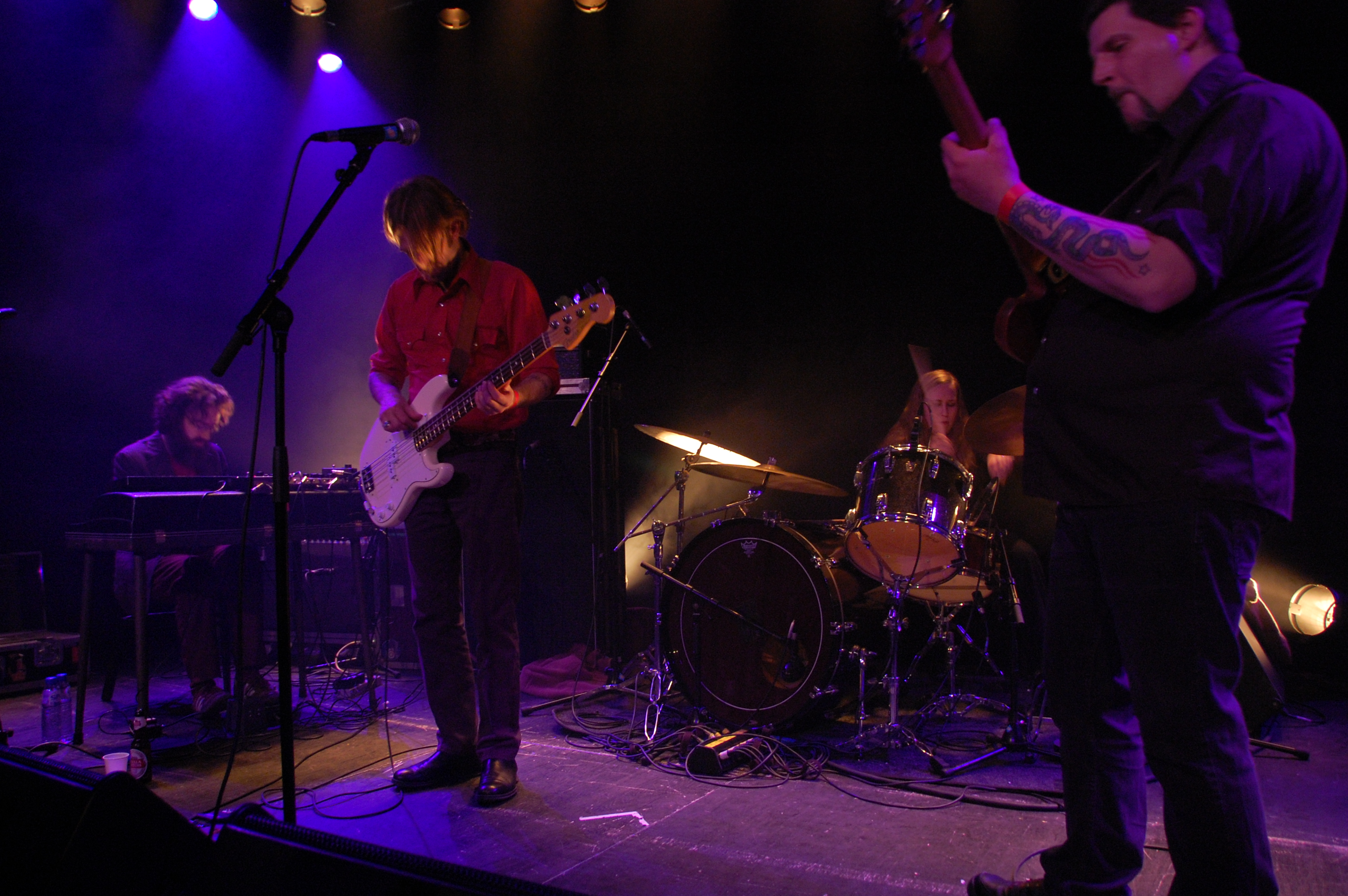 Earth actuando en Bélgica en 2009; de izquierda a derecha: Steve Moore (clave), Don McGreevy (bajo), Adrienne Davies (batería), Dylan Carlson (guitarra)